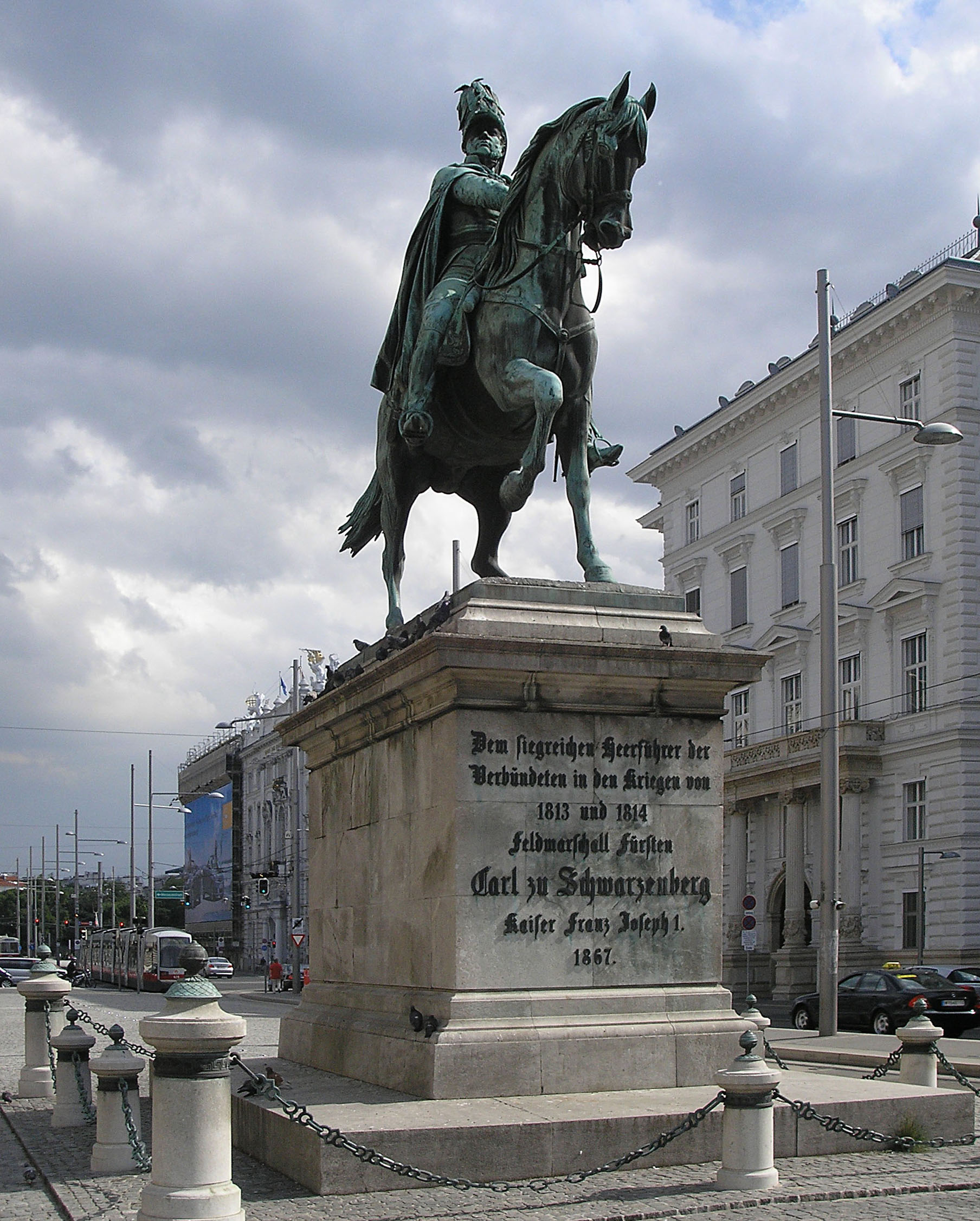 Monument to field-marshall Prince Carl zu Schwarzenberg at Schwarzenbergplatz in Vienna.